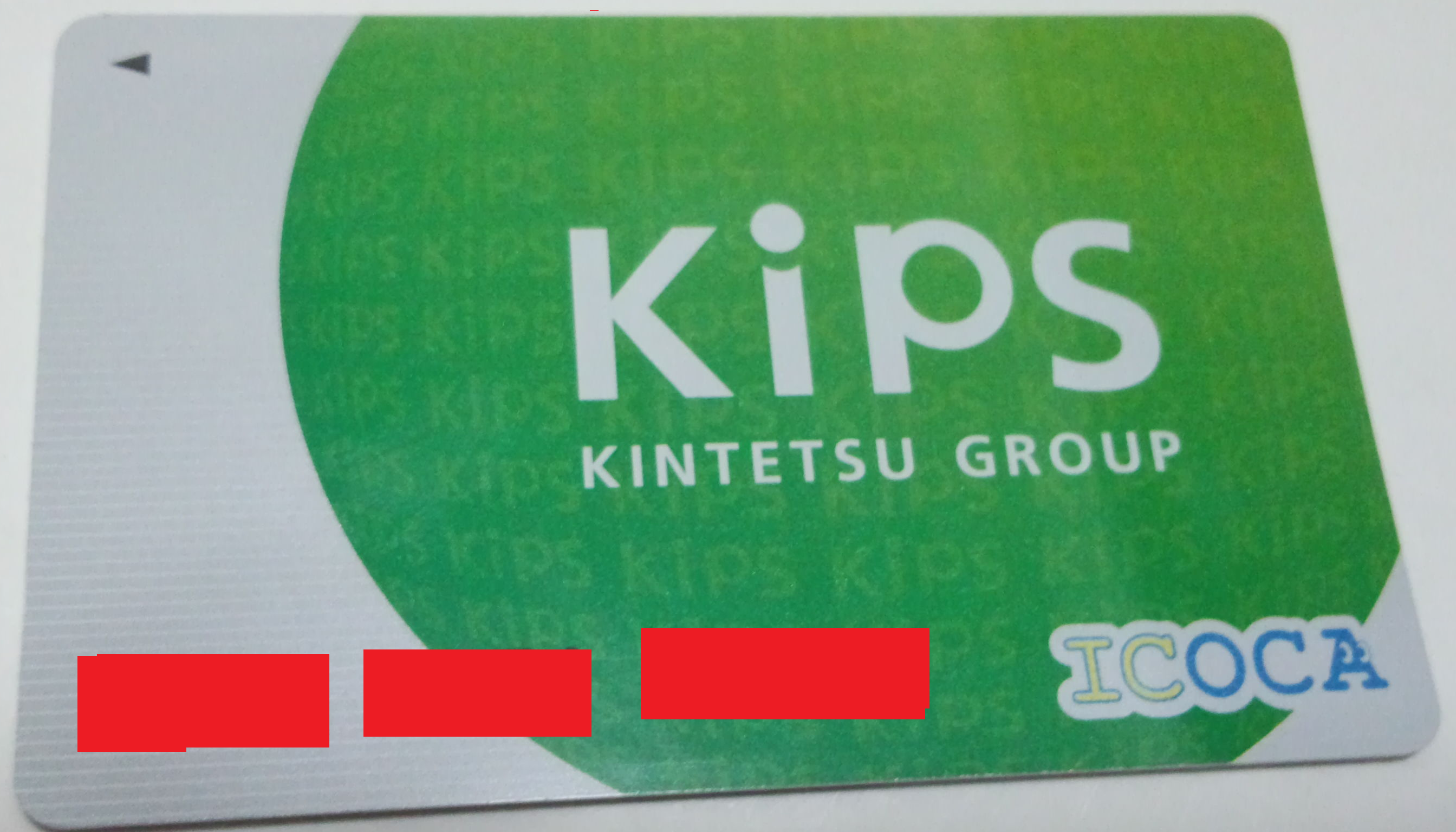 本写真の内赤く塗られた箇所には左から4桁、4桁、5桁の順に計13桁の数字のみのカード番号が表示されている。個人情報秘匿のため、番号の表示を隠している。 近鉄電車が発行している、IC乗車券ICOCAカード。ICOCAとの違いは近鉄電車や近商ストアー、近鉄百貨店などで利用すると利用額に応じてポイントが貯まる（概ね200円または100円で1ポイント）点である。また、その他に、一部の近鉄沿線の社寺仏閣（矢田寺や談山神社、弘川寺ほか）や、美術館（名古屋ボストン美術館や松伯美術館、入江泰吉記念奈良市写真美術館ほか）、観光施設（パルケエスパーニャやミキモト真珠島、志摩マリンランド、京都タワーほか）などの施設やホテル（神戸北野ホテルや奥日光高原ホテルほか）、ロープウェイ（別府ロープウェイ、御在所ロープウェイ）等の入場料等がカード提示で割り引かれることもある。